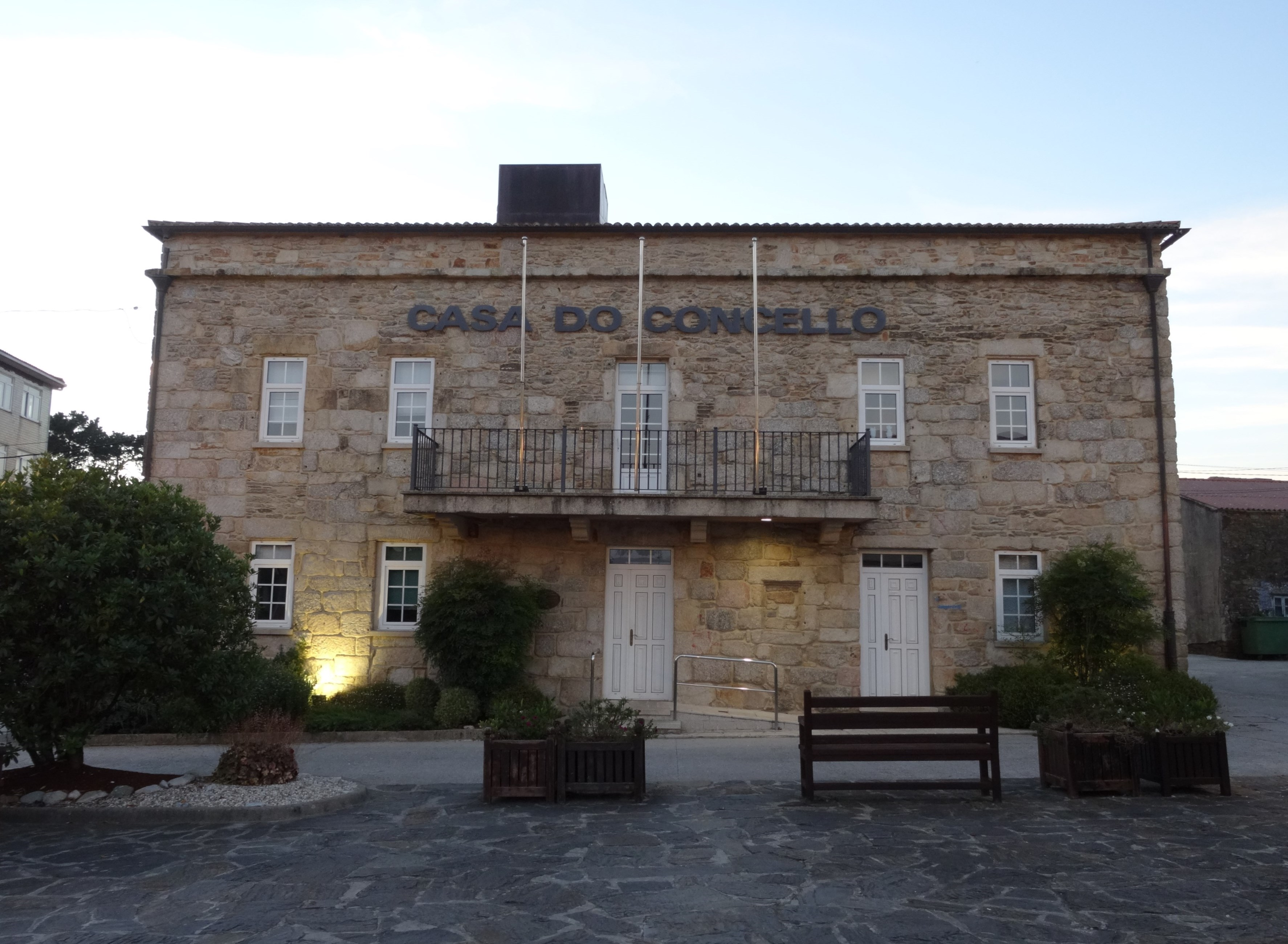 Casa do concello de Santa Comba, Coruña.